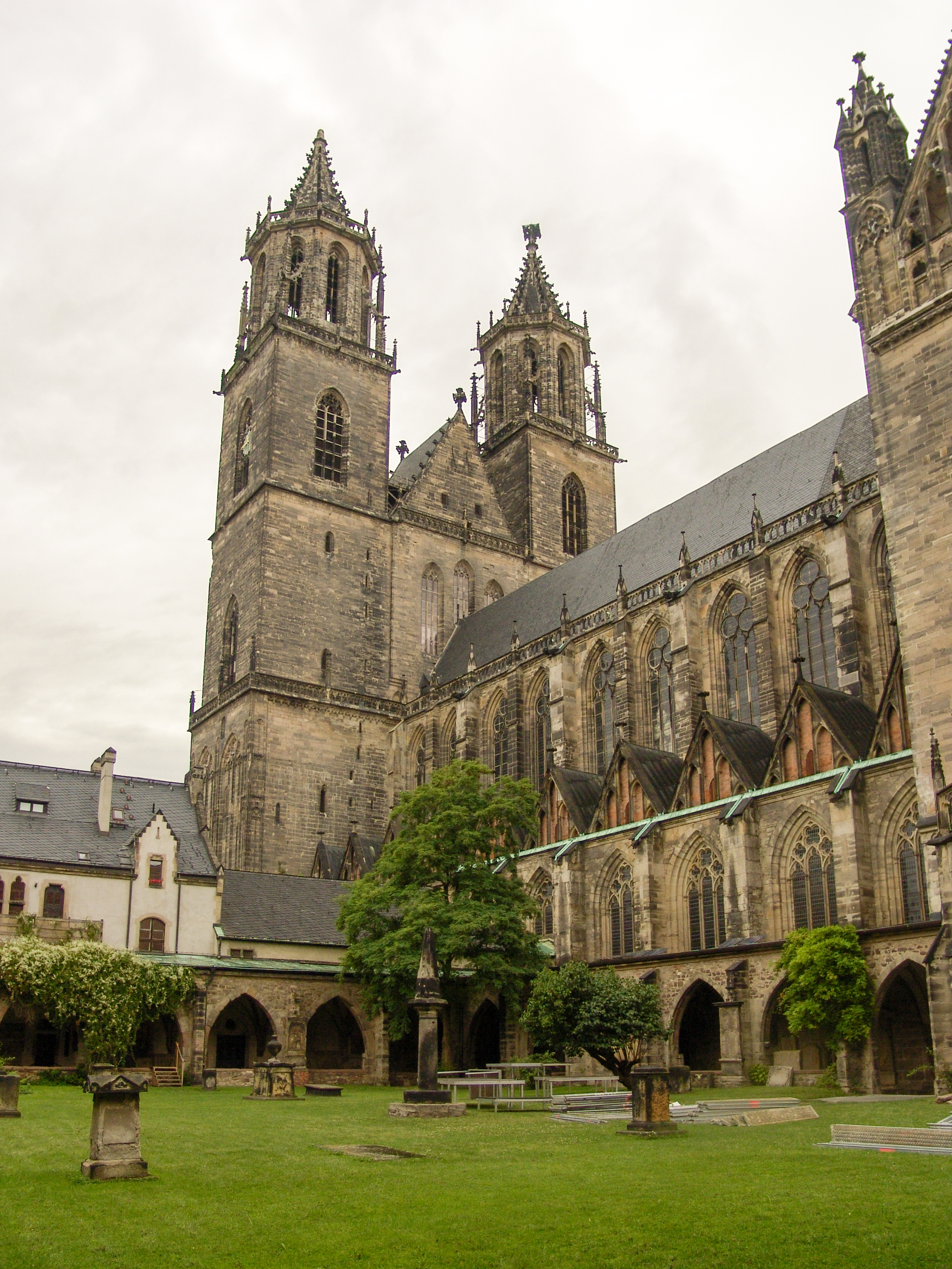 Magdeburger Dom